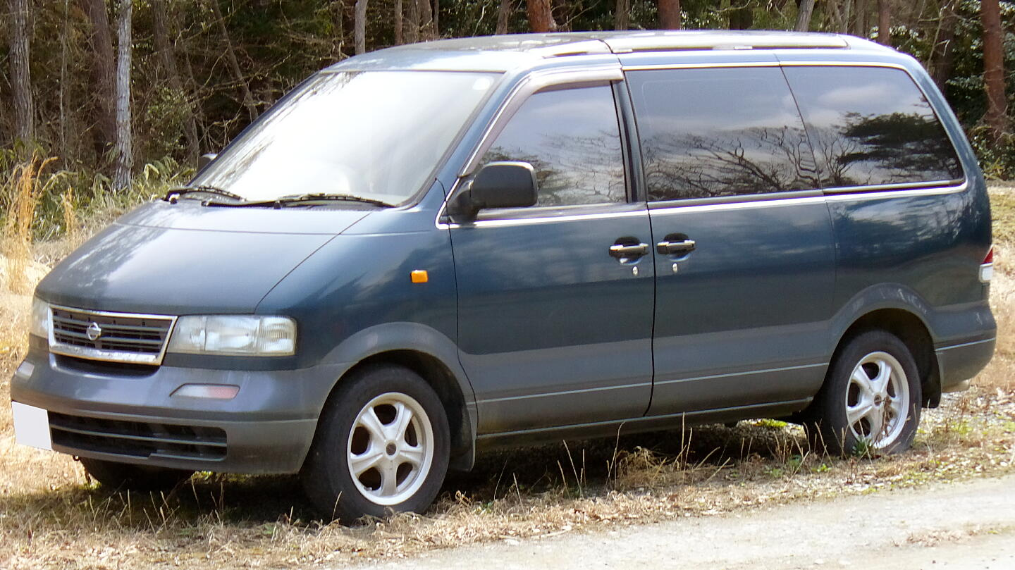 日産・ラルゴ（3代目）